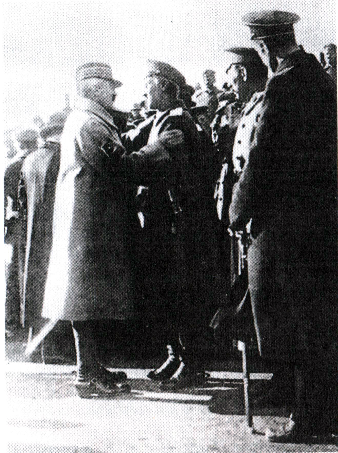 Верховный правитель России адмирал А.В. Колчак и главнокомандующий союзными войсками в Сибири и на Дальнем Востоке французский генерал Жаннен